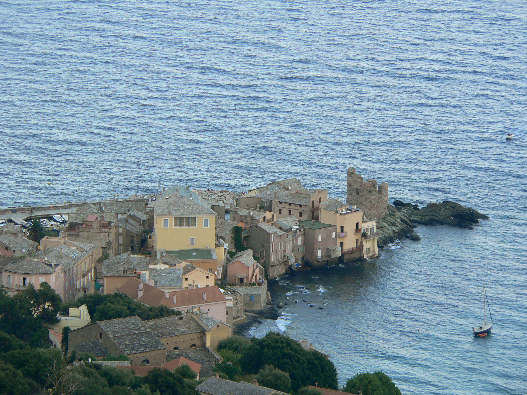 Erbalonga (Erbalunga) Commune de Brando (Brandu) - Haute-Corse Zouzou